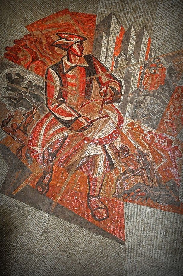 Москва, метро Красносельская, мозаика "Красный Барабанщик", 1969 г